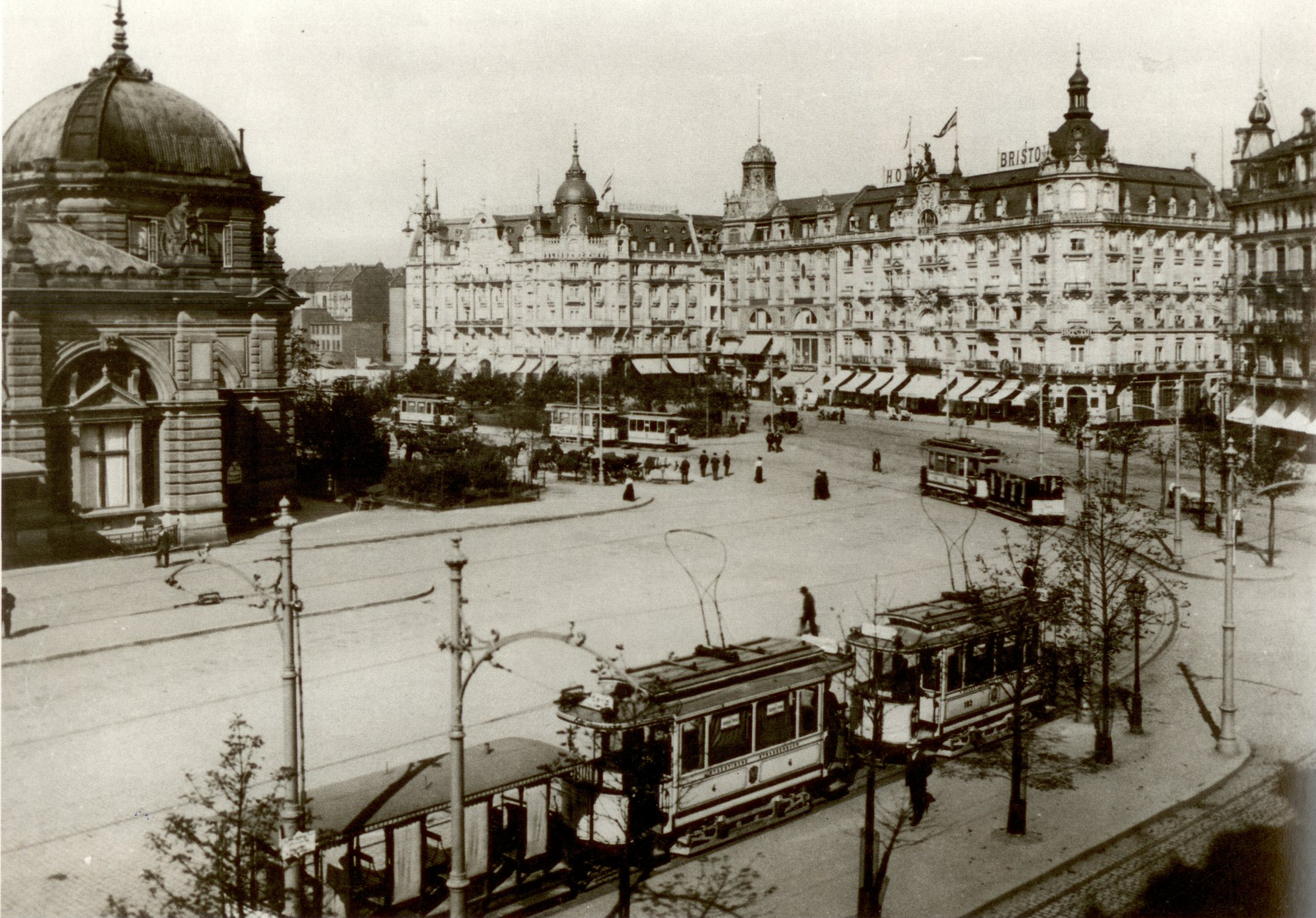 Frankfurt am Main: Photographie des Platzes am Hauptbahnhof von Südwesten, 1903.